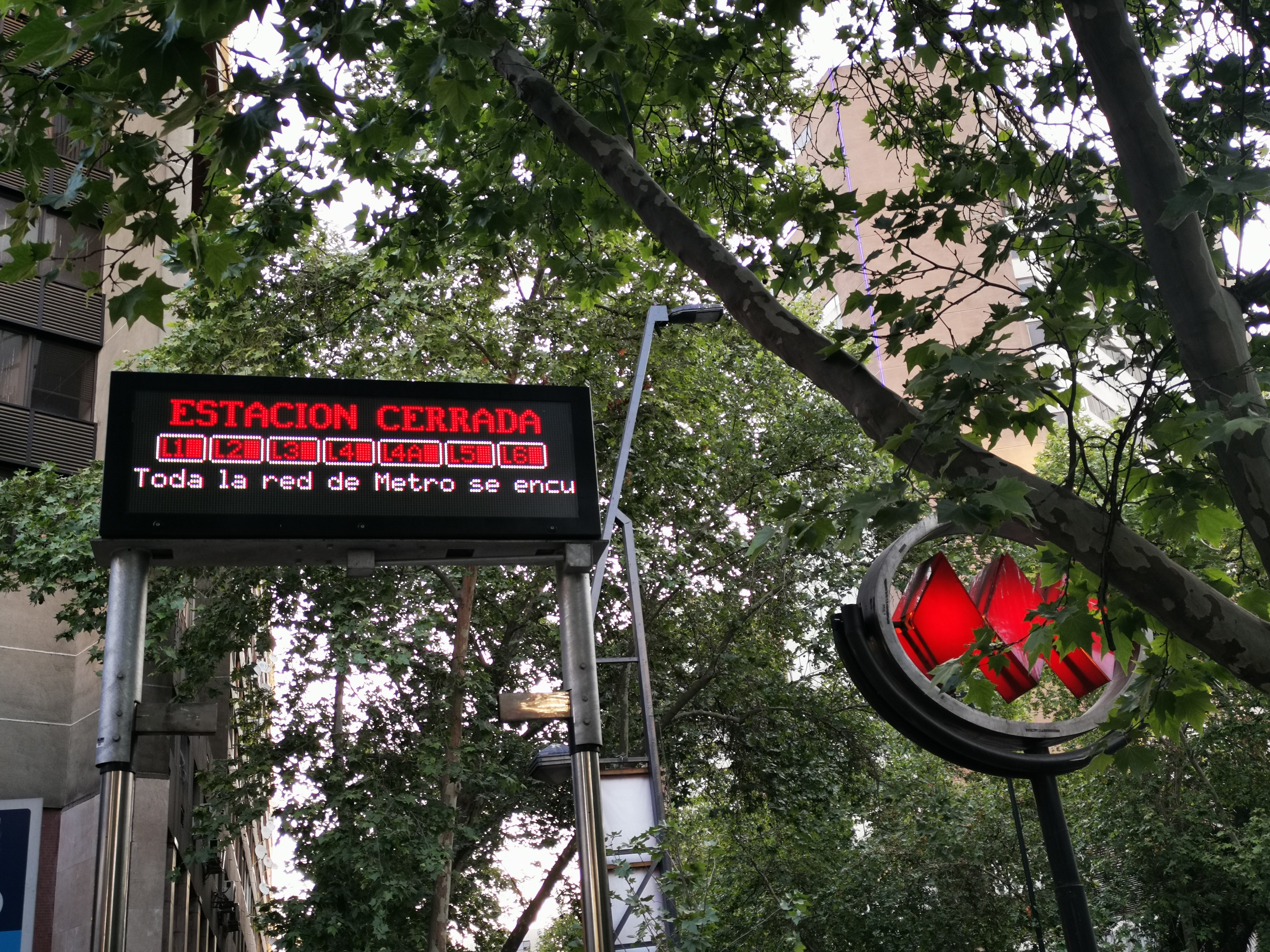 Letrero de la estación Los Leones del Metro de Santiago la tarde del 18 de octubre indicando el cierre de todas las líneas del metro.